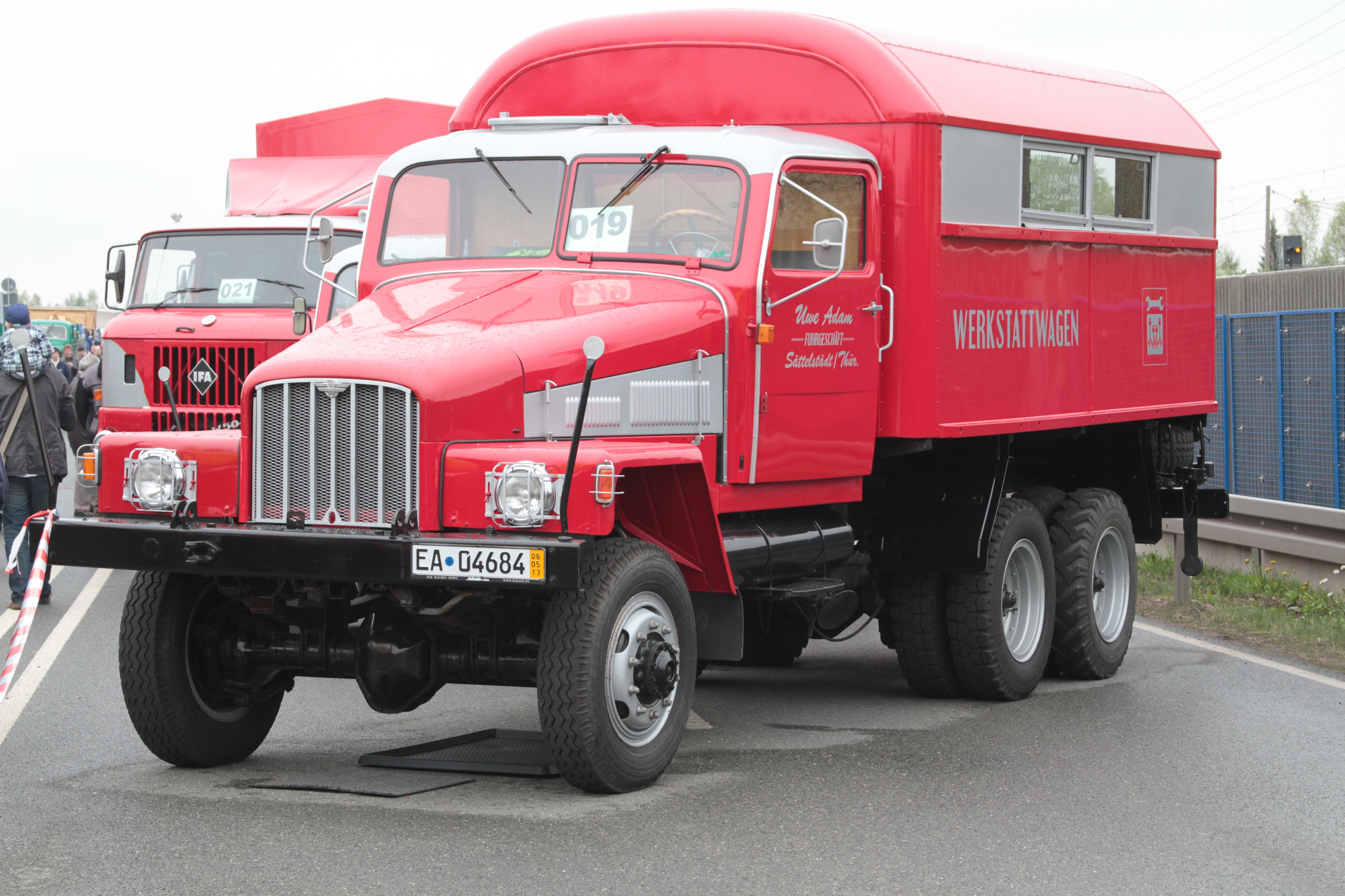 16. IFA Oldtimertreffen Werdau 2013, Germany